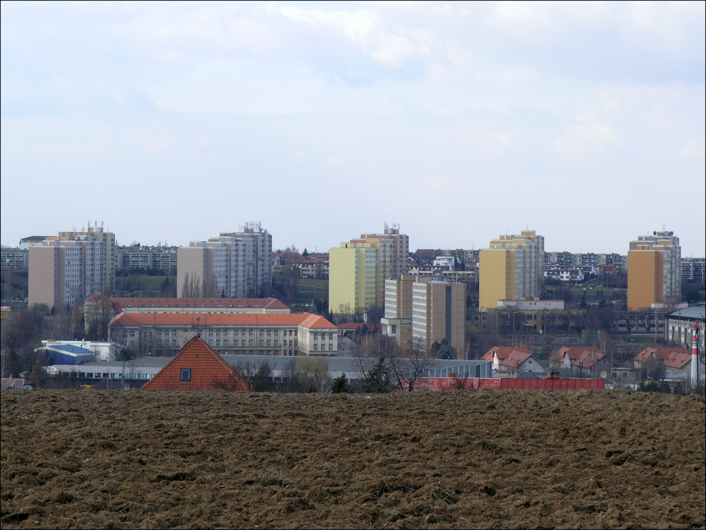 Česky: Sídliště Na Dědině v Praze